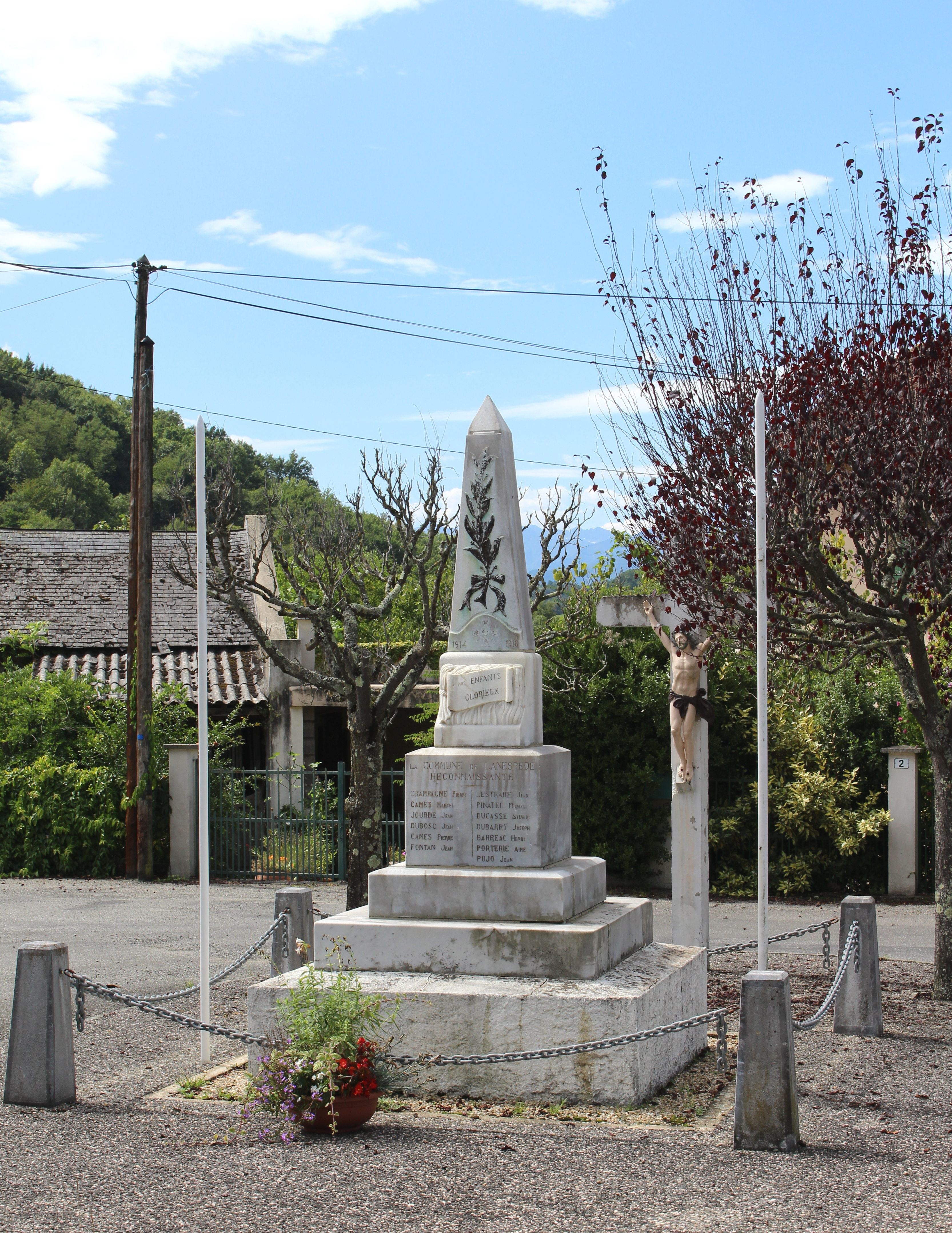 Monument aux morts de Lanespède (Hautes-Pyrénées)